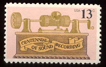 US postage stamp, 1977.